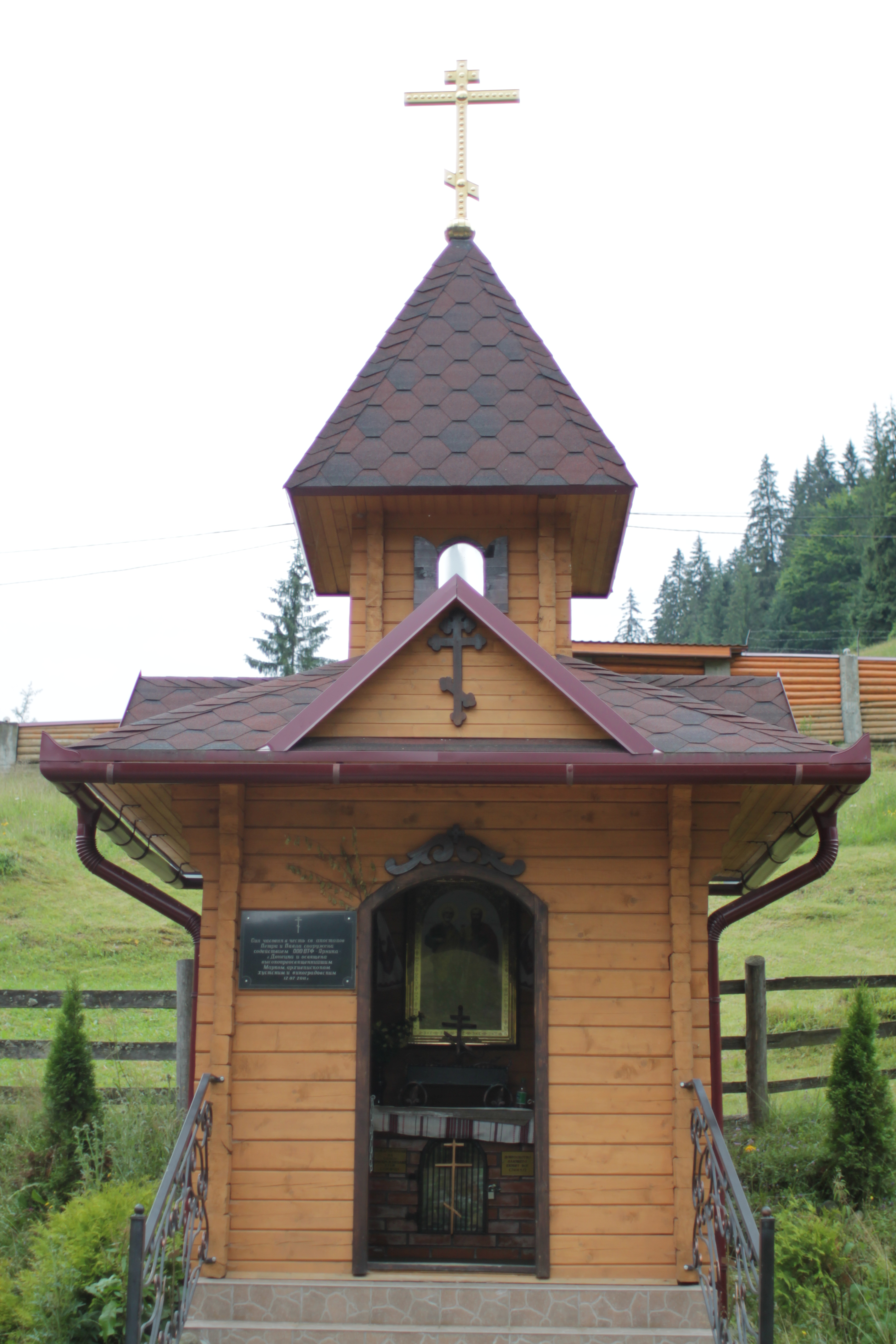 Синевир, церква